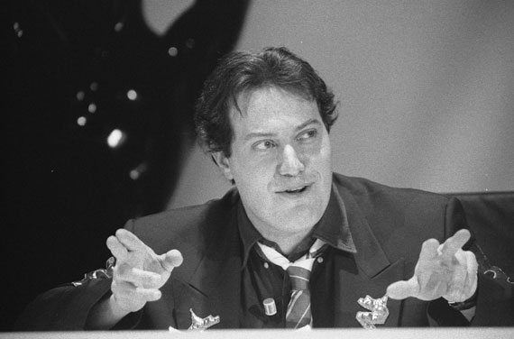 Foto di Emilio Fede, imitato da Corrado Guzzanti